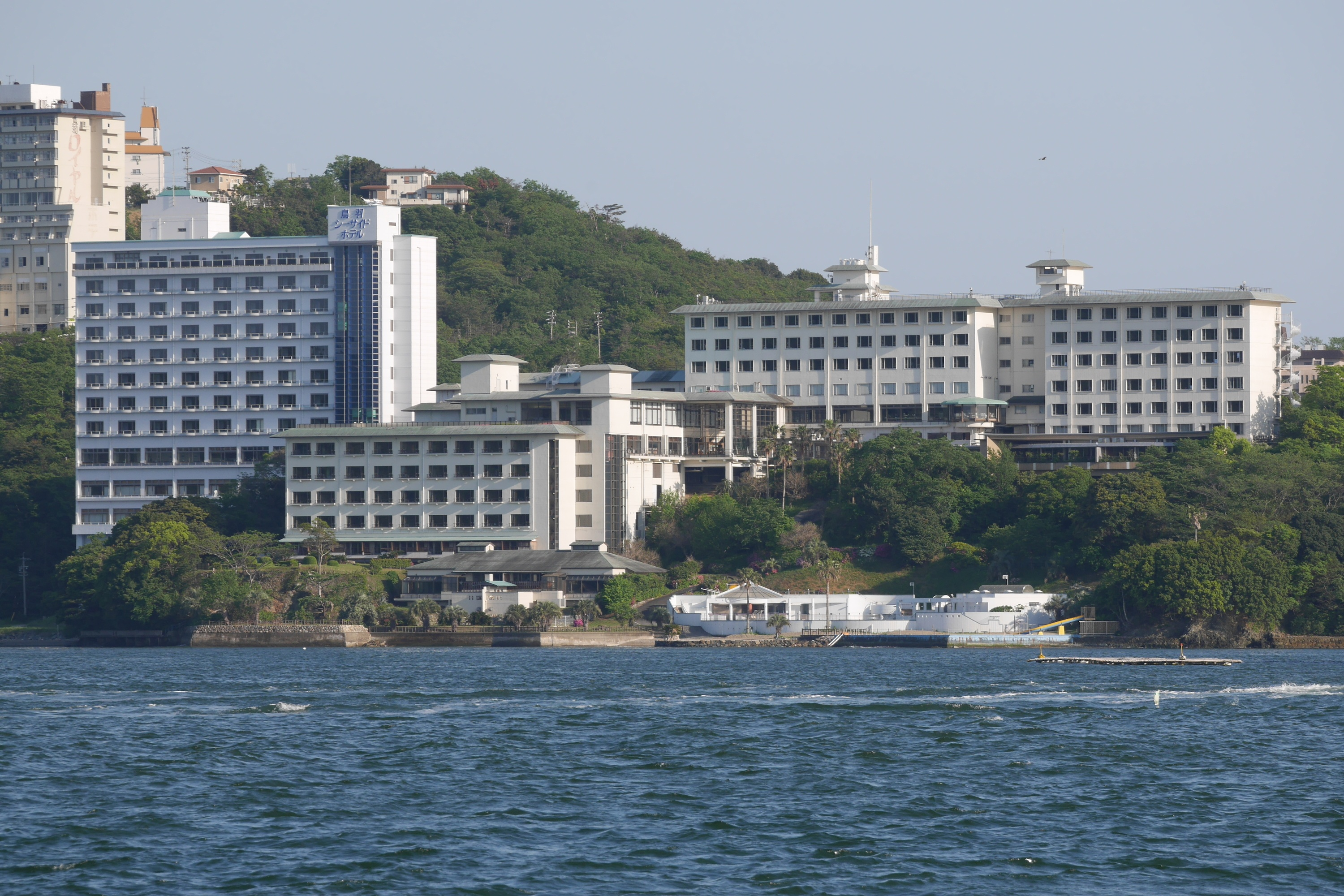 三重県鳥羽市安楽島町にある鳥羽シーサイドホテル。